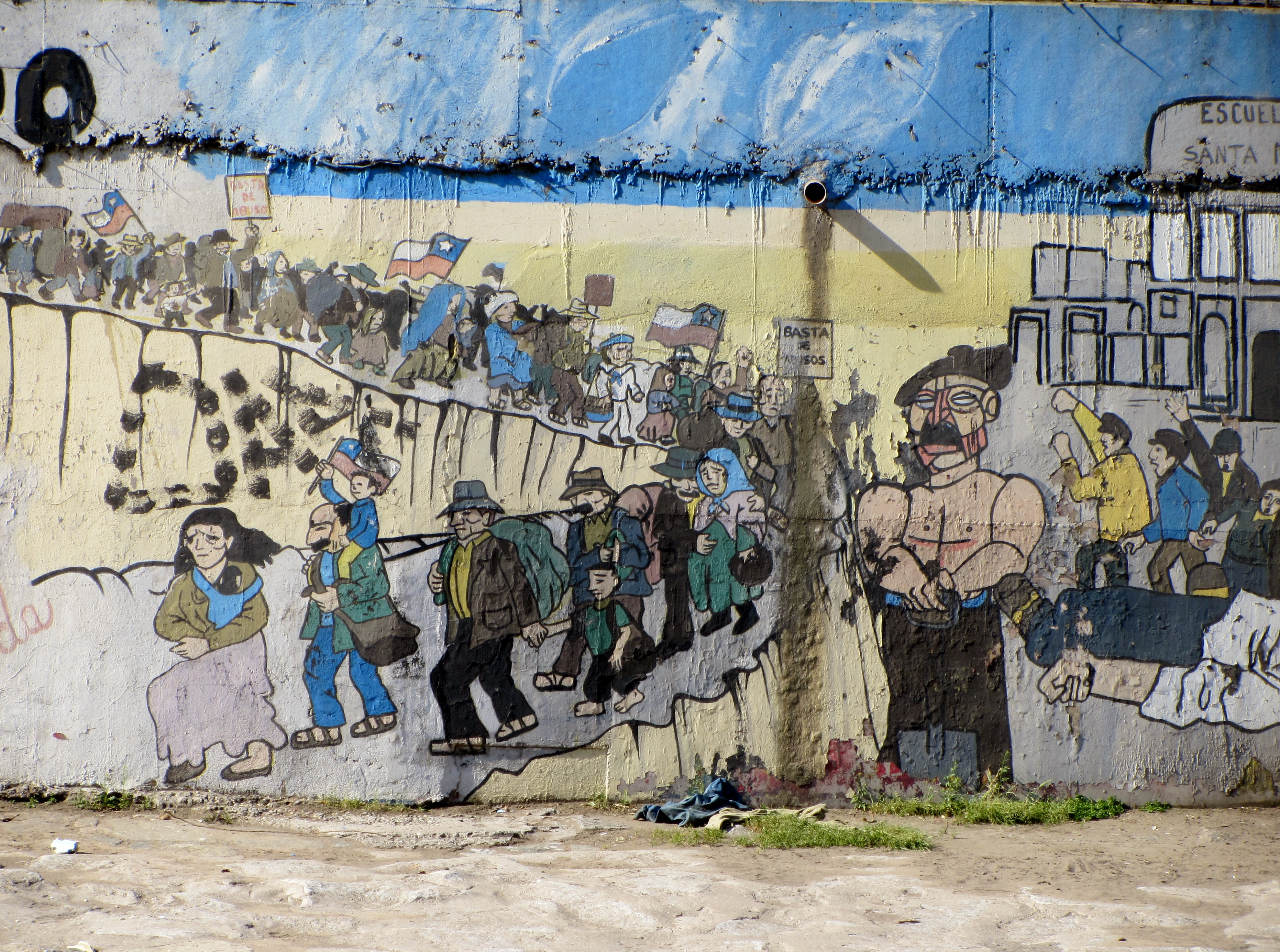 100 años del Partido Comunista de Chile, homenaje de los grafiteros del PC, ribera norte del río Mapocho, 2012. La pintura muestra marchando a los obreros del salitre en huelga; en el extremo derecho, la Escuela Santa María de Iquique, donde el 21 de diciembre de 1907 se produjo la matanza homónima, en la que fueron asesinadas más de 2.000 personas